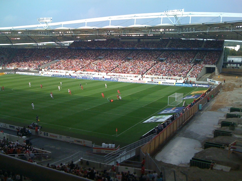 VfB Stuttgart - 1. FC Köln in the Mercedes-Benz Arena